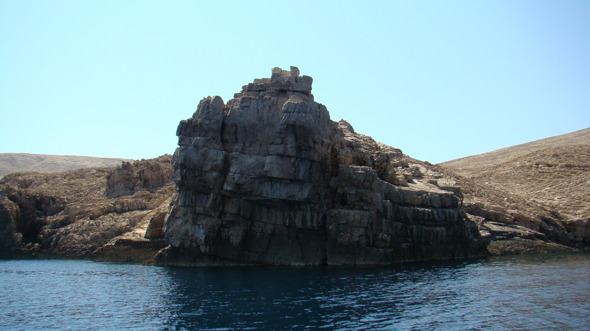 Skaly